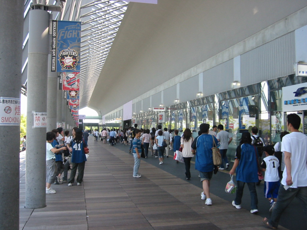 撮影場所:札幌ドーム 撮影日:2007年8月19日 撮影者:モンモン 2008年3月12日 (水) 17:37 . . もんもん . . 1,024×768 (243 キロバイト)